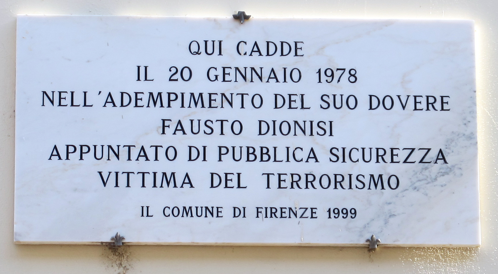 Via delle casine, montedomini, targa fausto dionisi